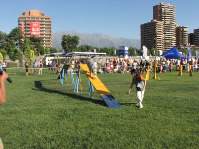 Campeonato de Agility Copa Bicentenario